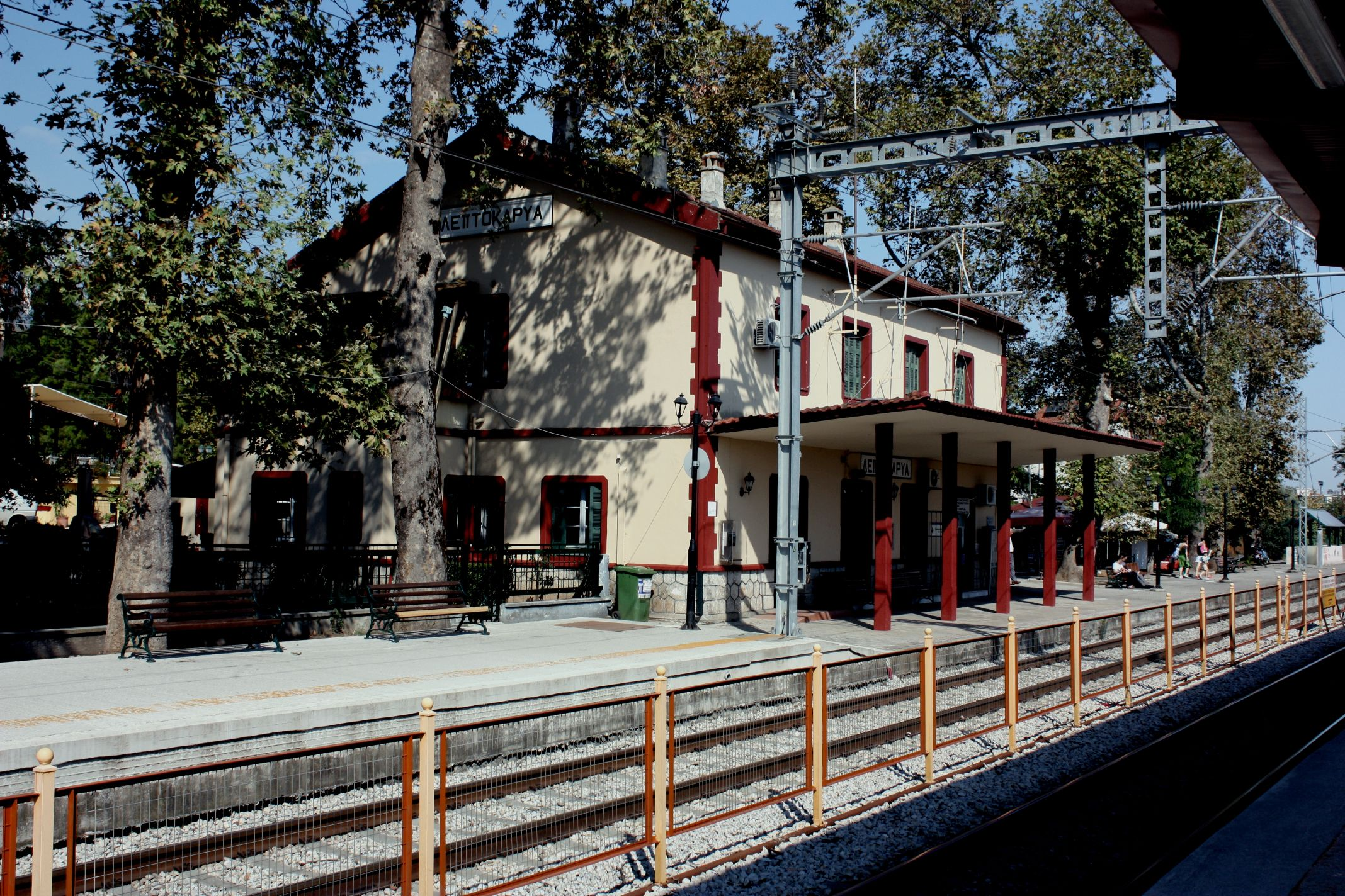 Bahnhof in Leptokaria